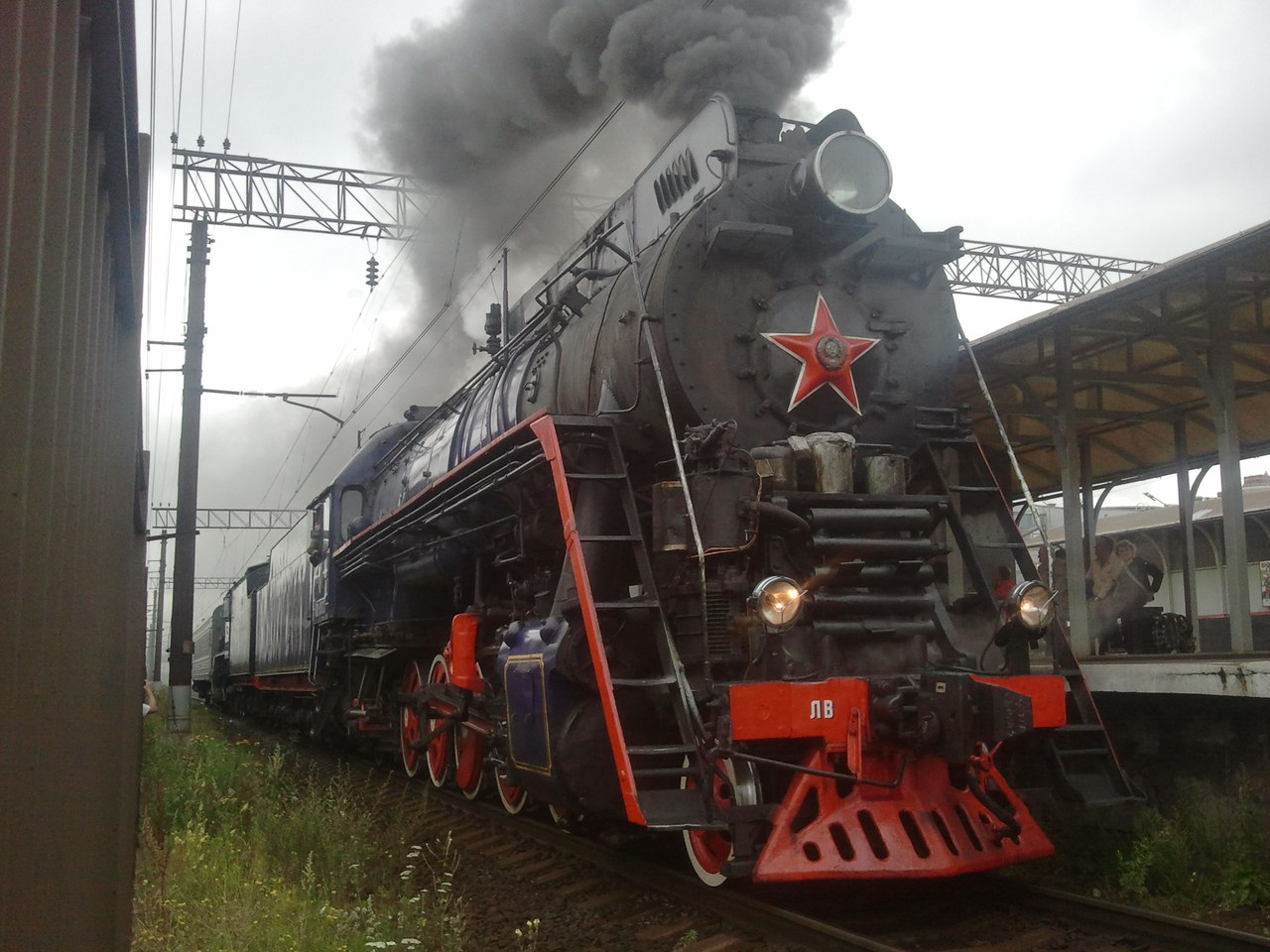 Витебское направление ОЖД